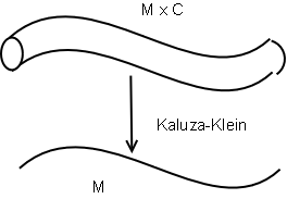 An illustration of a Kaluza-Klein decomposition